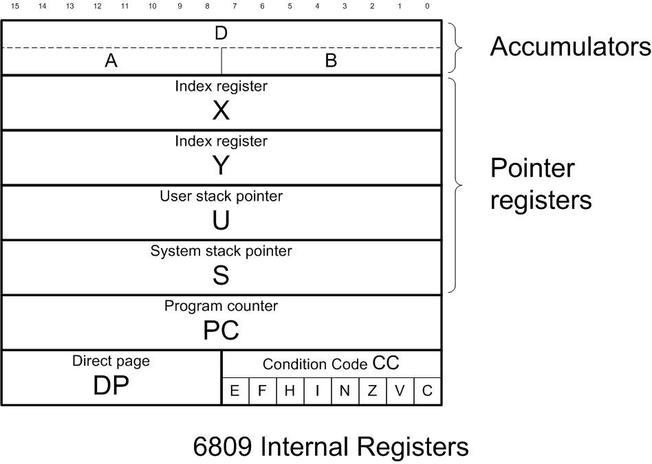 Motorola 6809 - internal registers